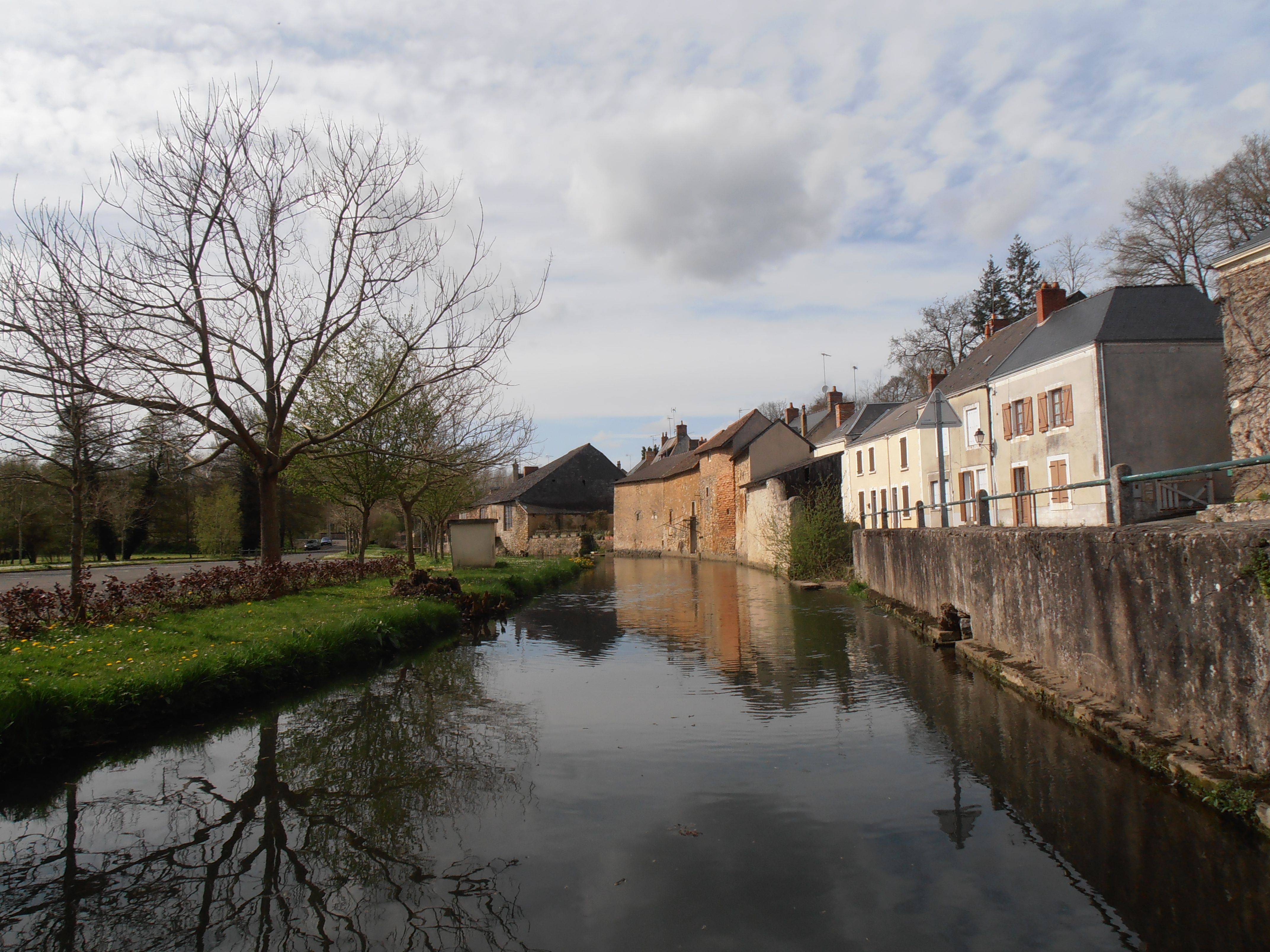 Le centre d'Avoisé